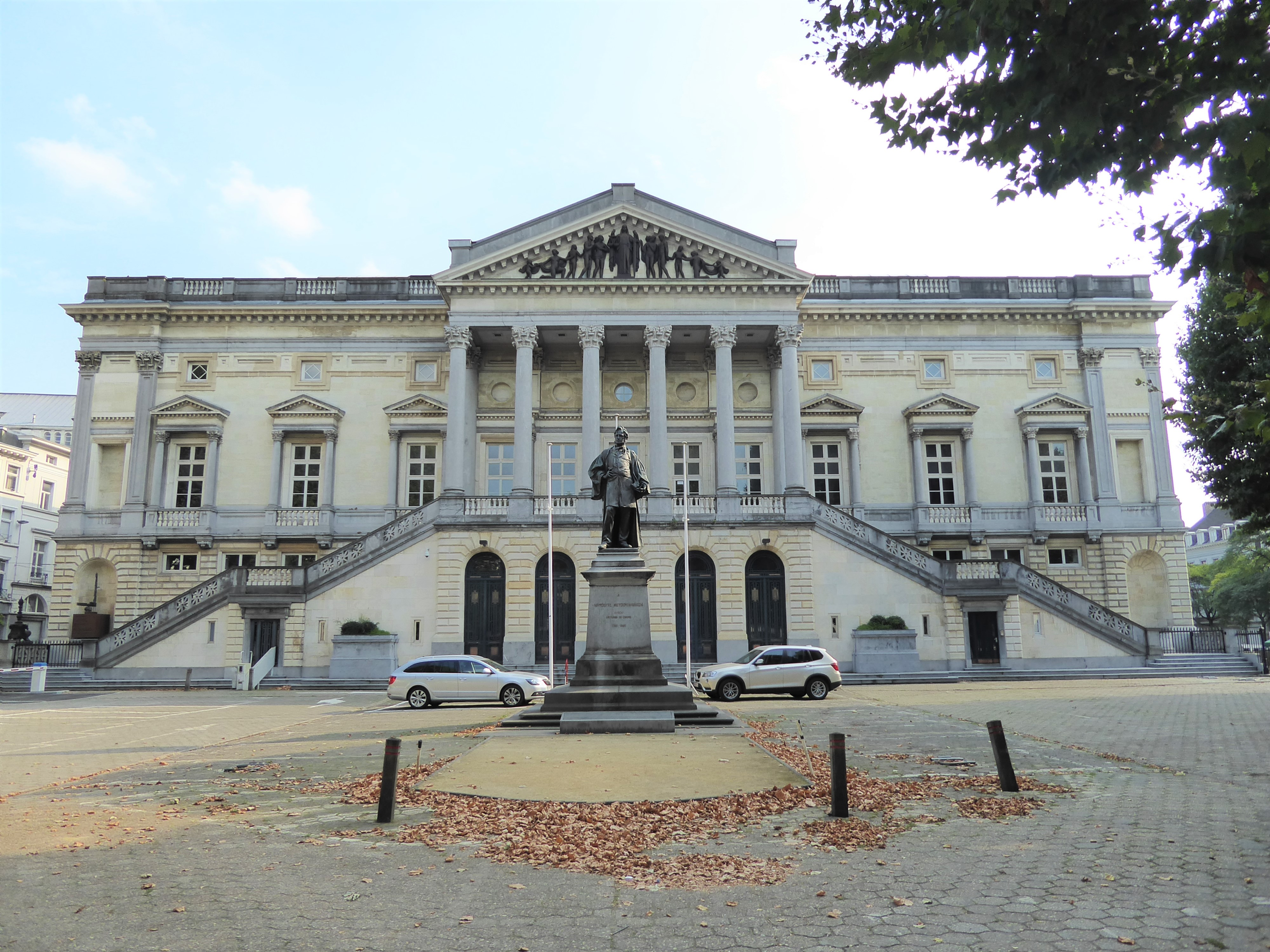 Frontaal aanzicht van het oud gerechtsgebouw aan het Koophandelsplein in Gent